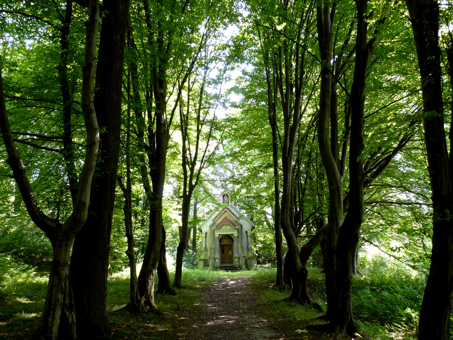 Kaplica grobowa Starzeńskich